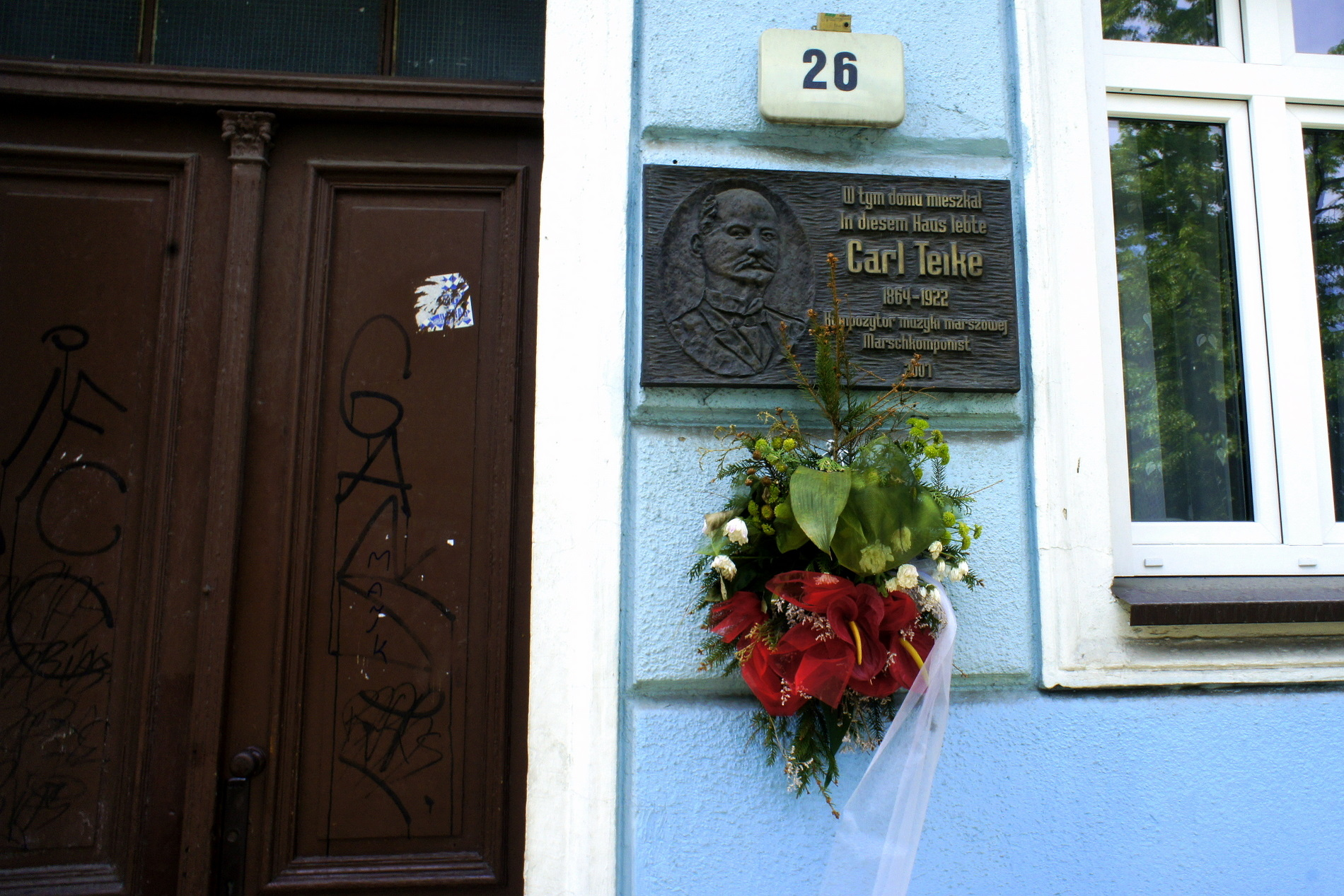 Gorzów Wlkp., ul. Kosynierów Gdyńskich 26. Tablica pamiątkowa na budynku w którym mieszkał Carl Teike, niemiecki kompozytor marszów wojskowych (m.in. marszu „Alte Kameraden”).